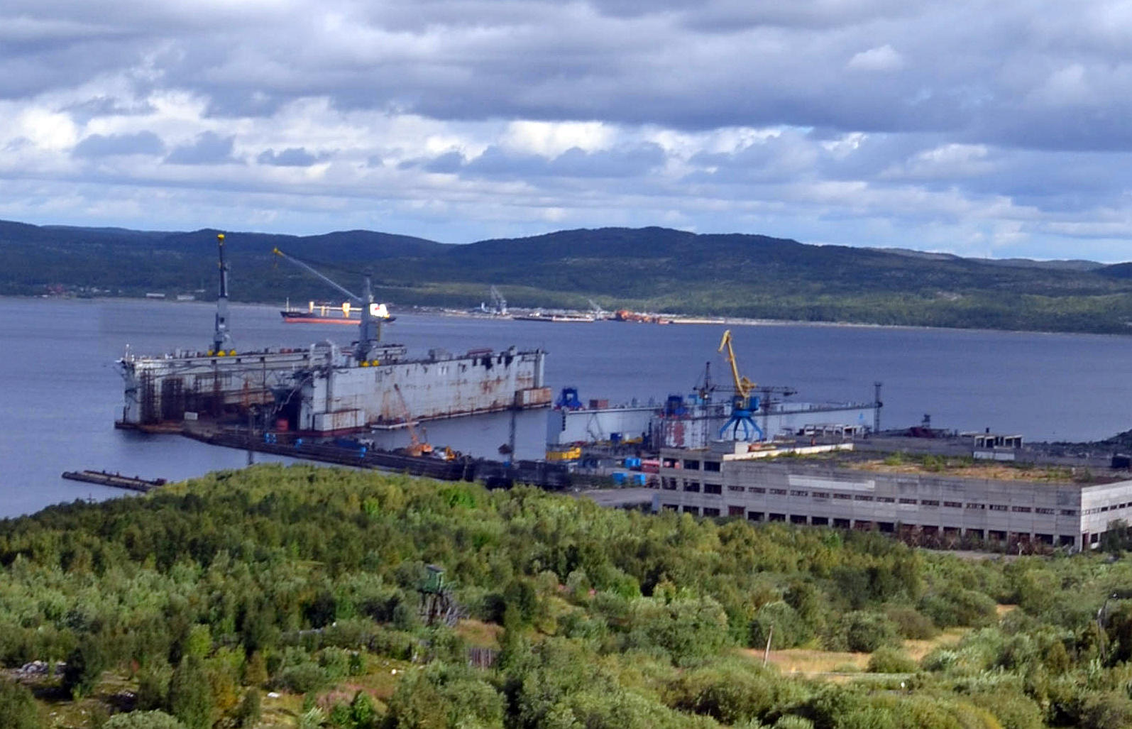 Schwimdock PD-50 in Rosljakowo, Russland.